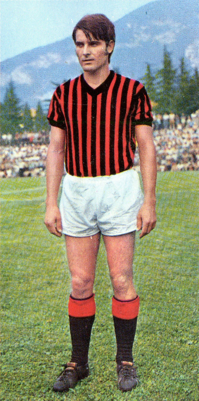 Il calciatore italiano Giorgio Biasiolo al Milan nella stagione 1970-71.